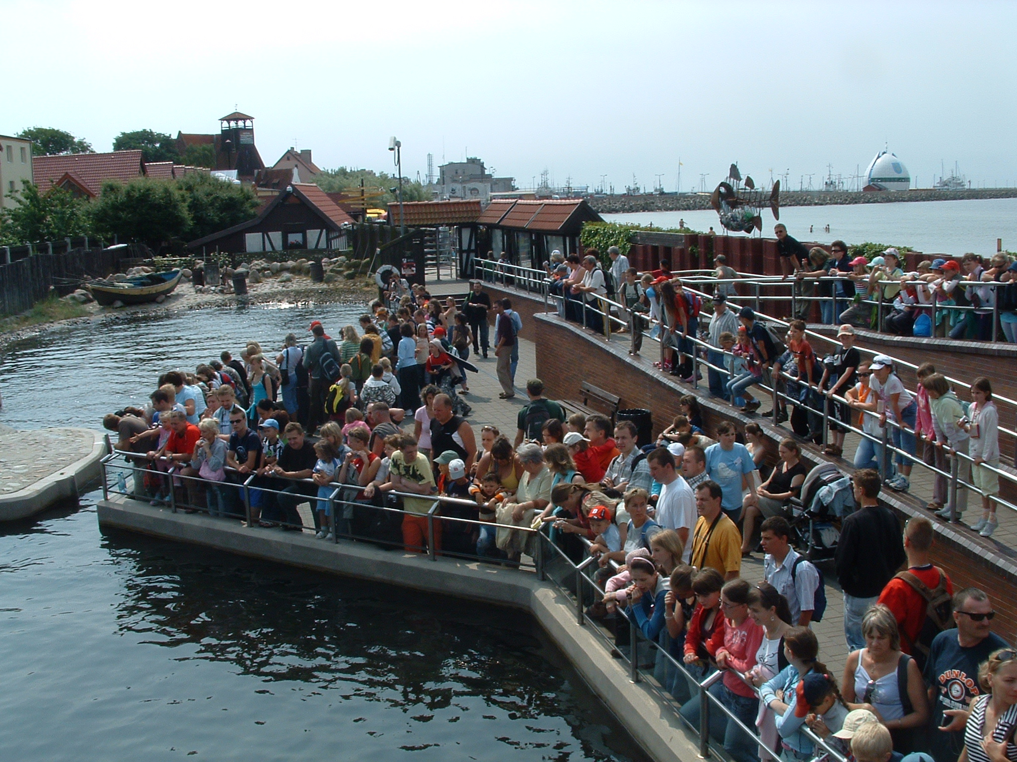 Fokarium (Hel)